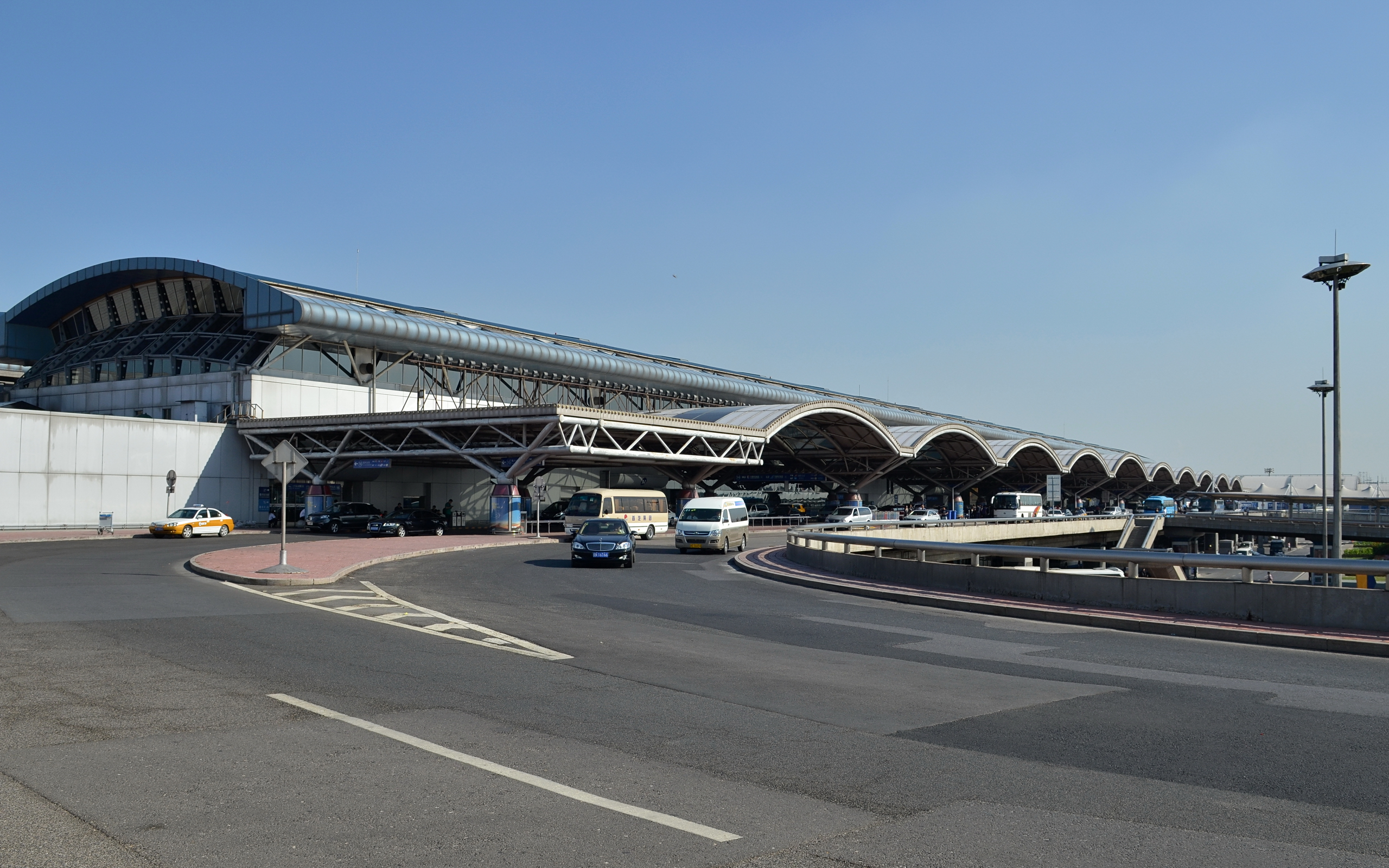 中文（中国大陆）: 北京首都国际机场2号航站楼